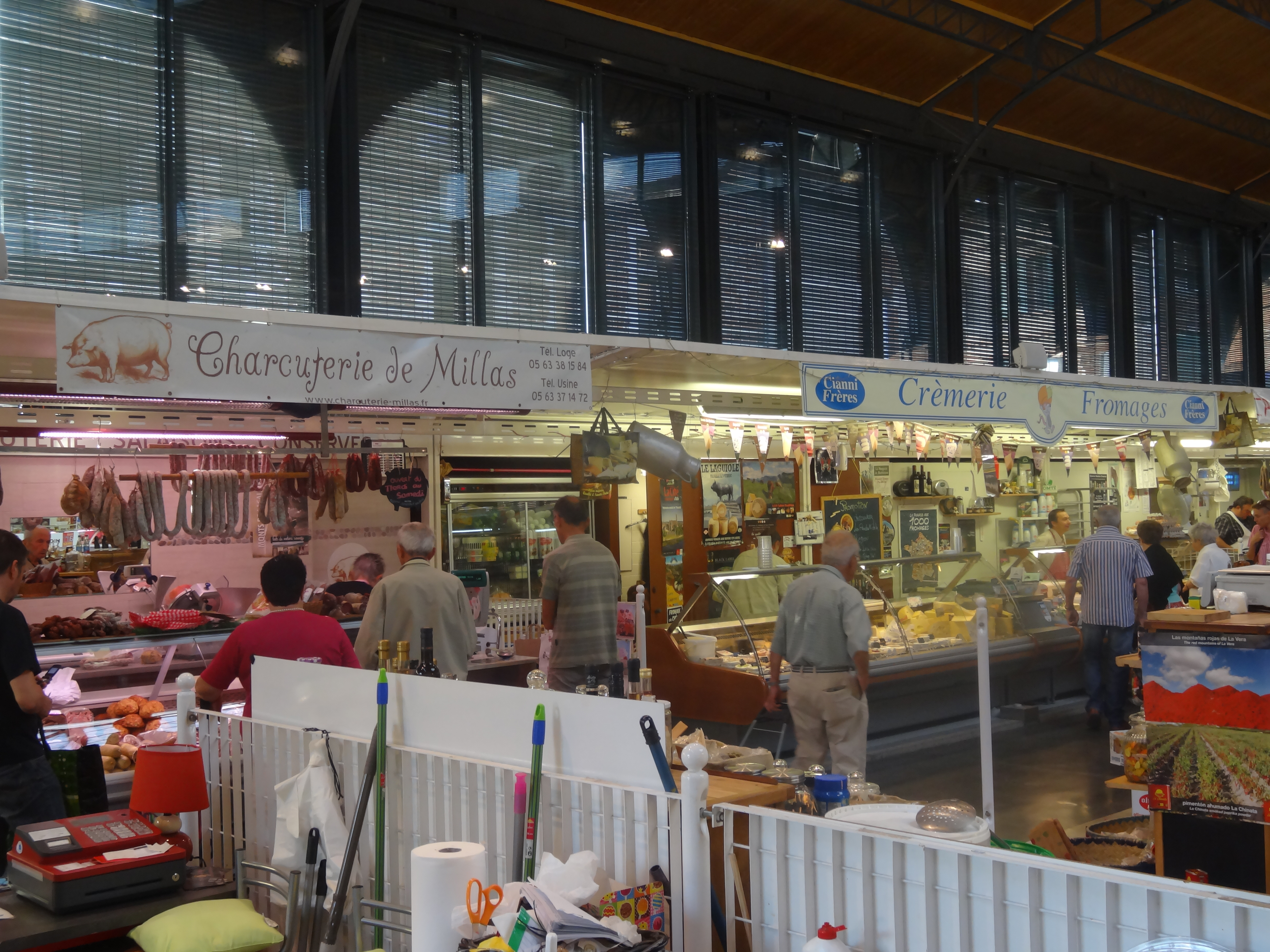 Marché couvert d'Albi